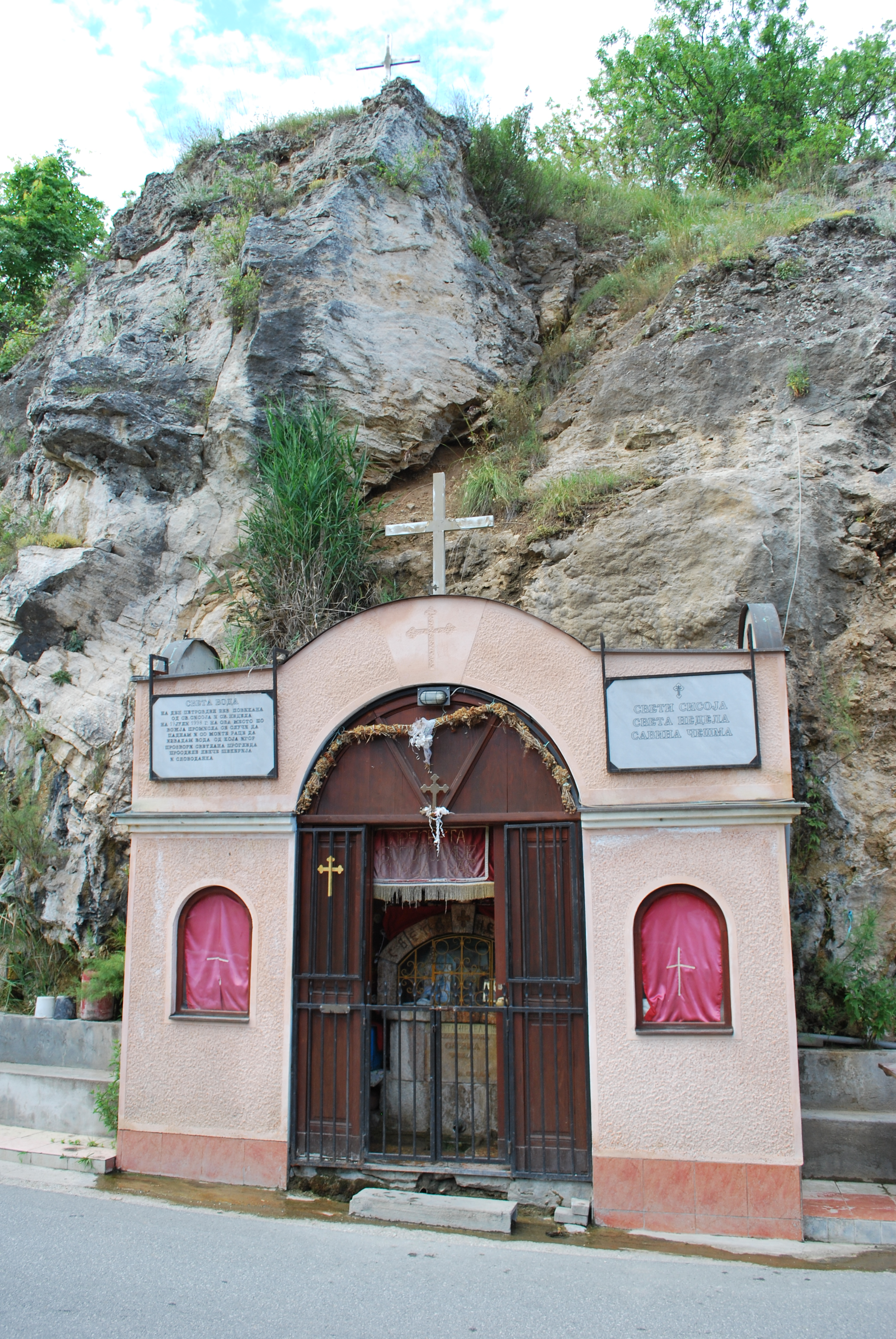 Савина Чешма, Катланово